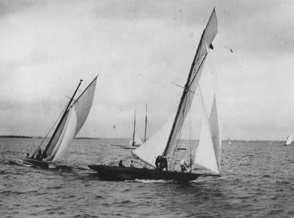 Finländska Rarahu går mot seger i kamp om Sinebrychoffpokalen med svenska Blenda 1899.